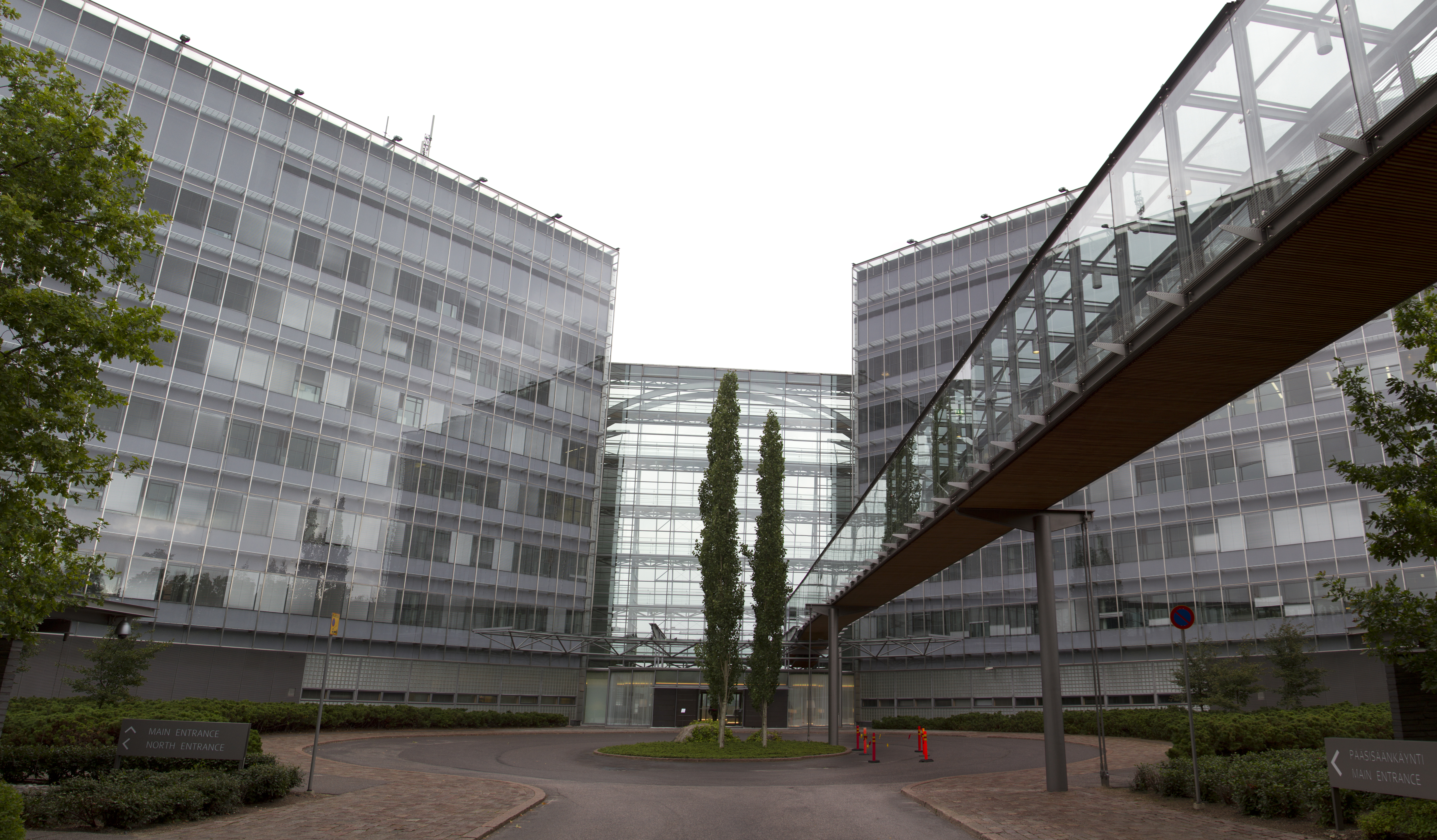 Nokian pääkonttorin pääsisäänkäynti.